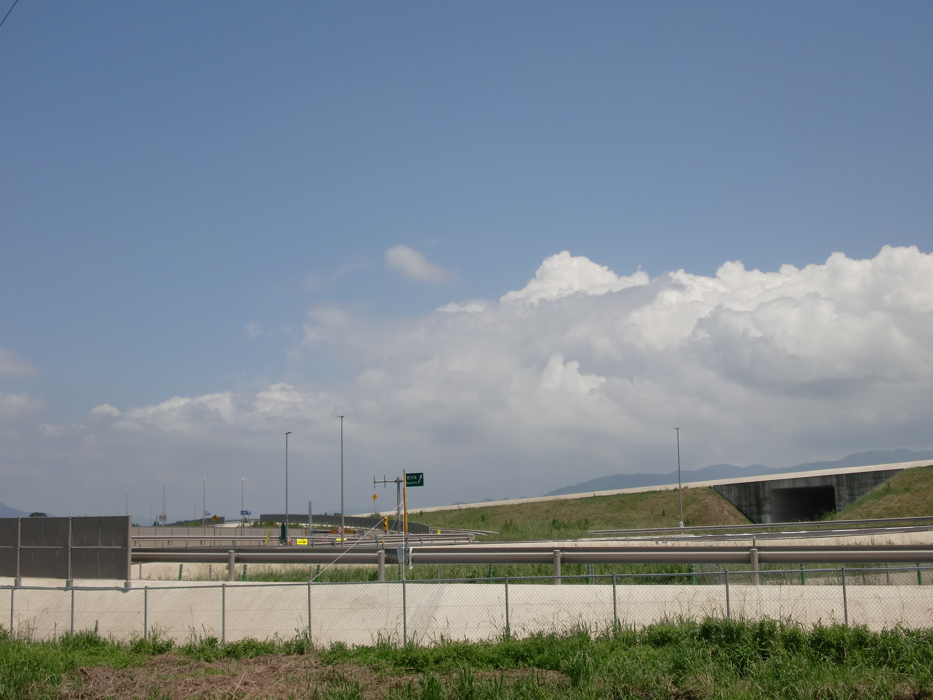 野田インターチェンジのランプ内の分岐点を側道から撮影